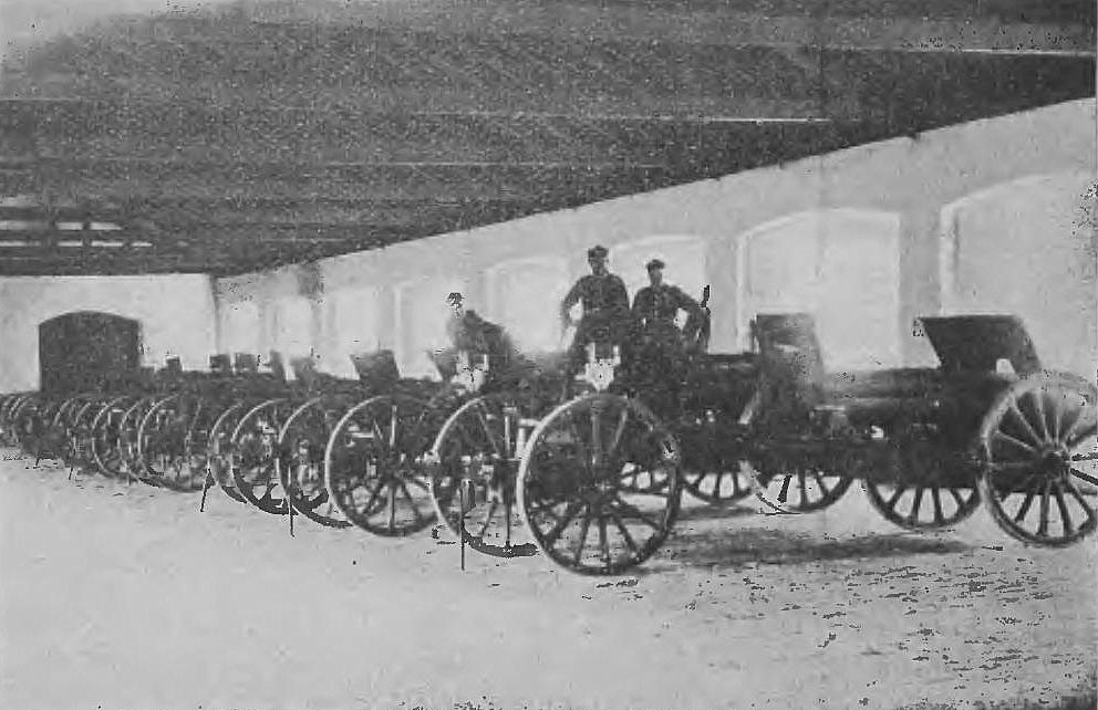 Działownia 10 pułku art. ciężkiej (-1933)